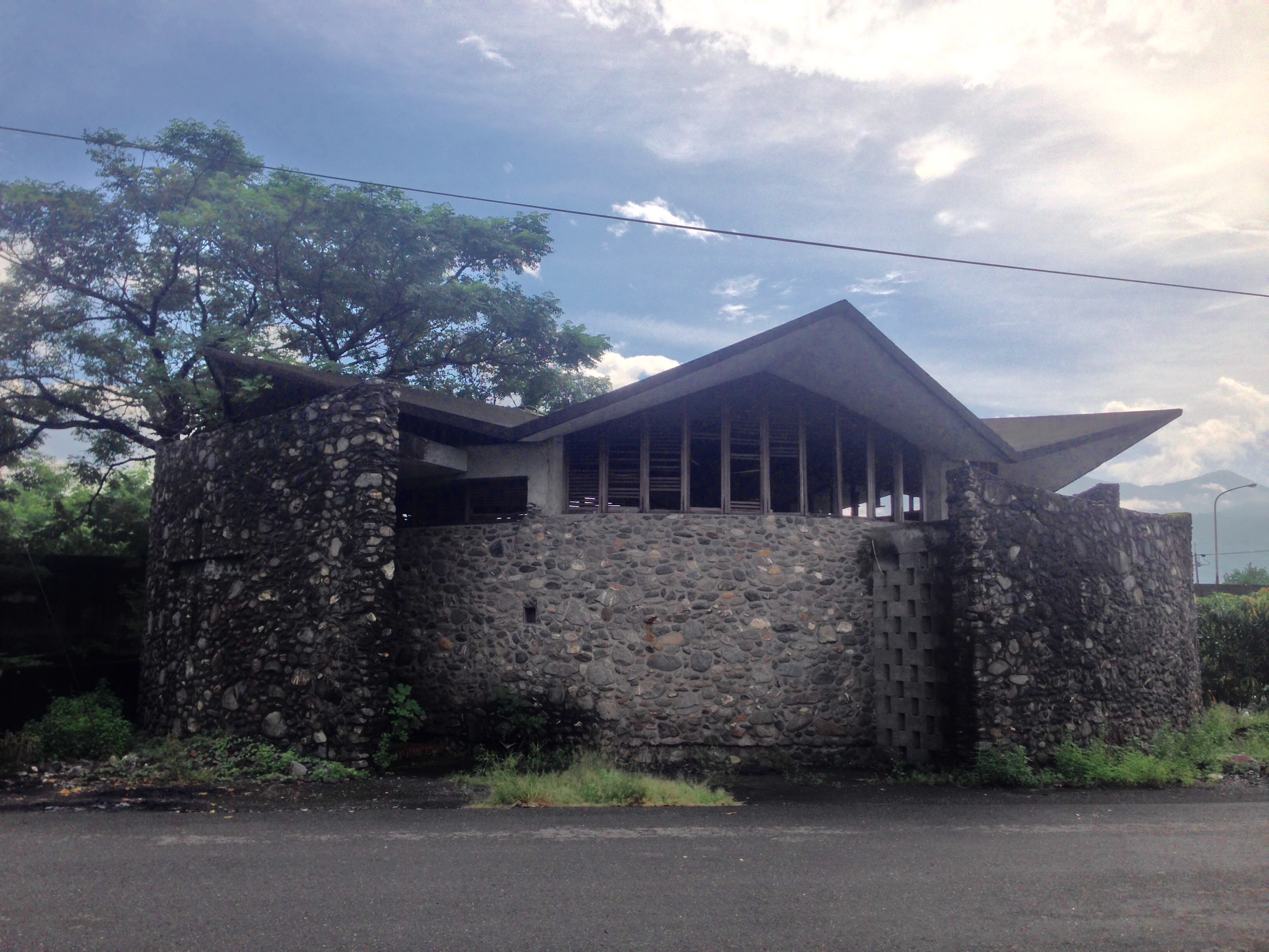 中文（台灣）: 新埤玉環善牧天主堂